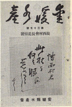 愛媛県水産会機関誌 第三十五号表紙